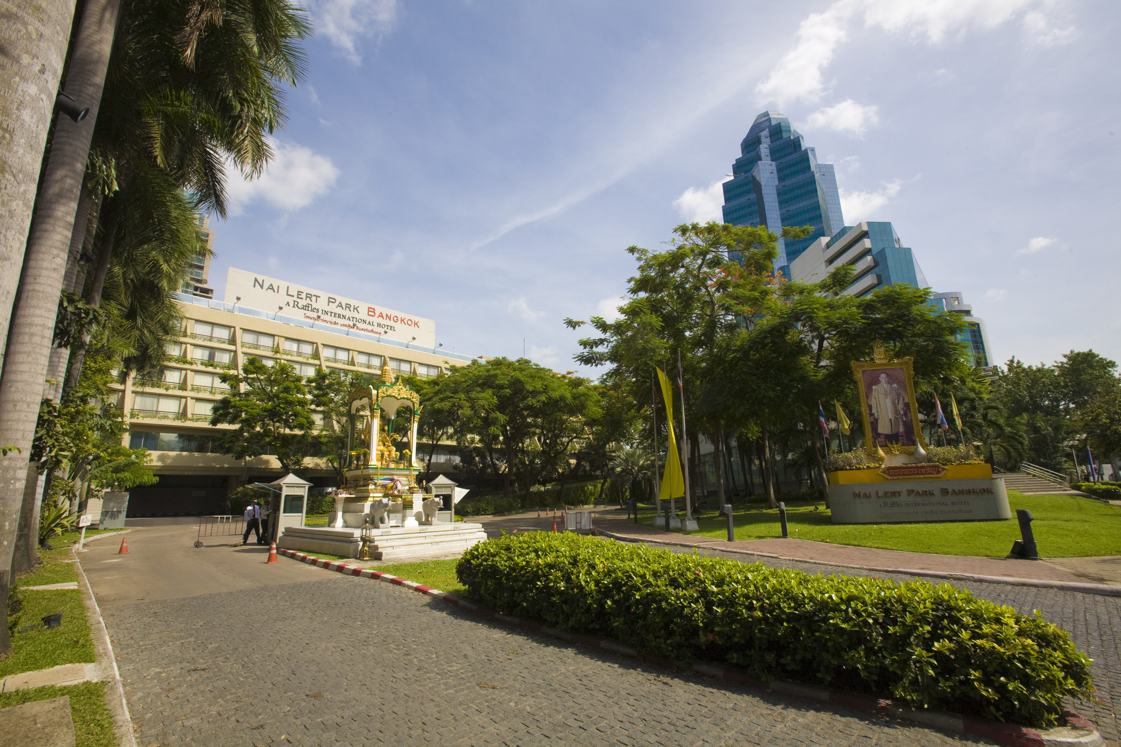 Nai Lert Park